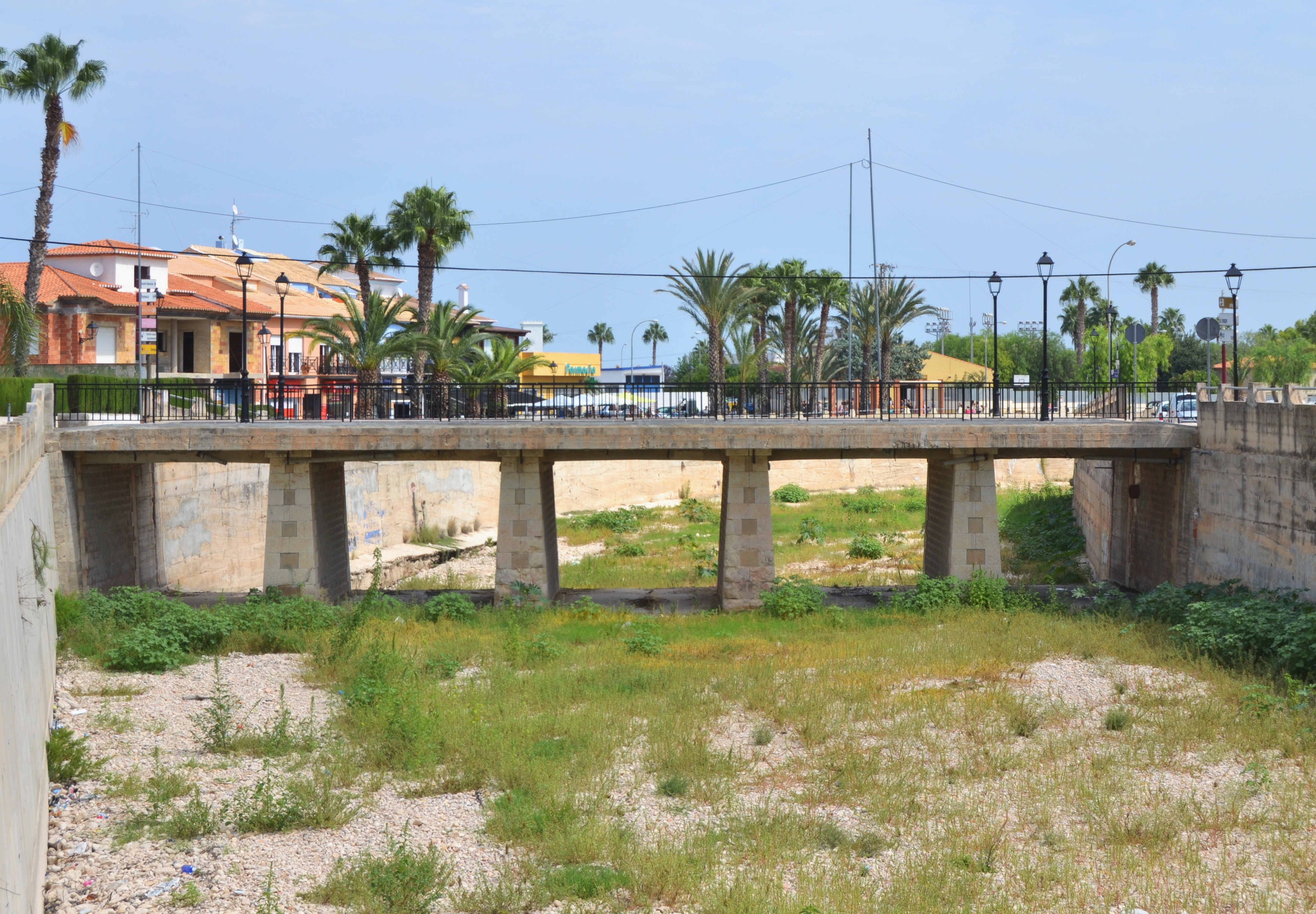 Pont sobre el Girona als Poblets.